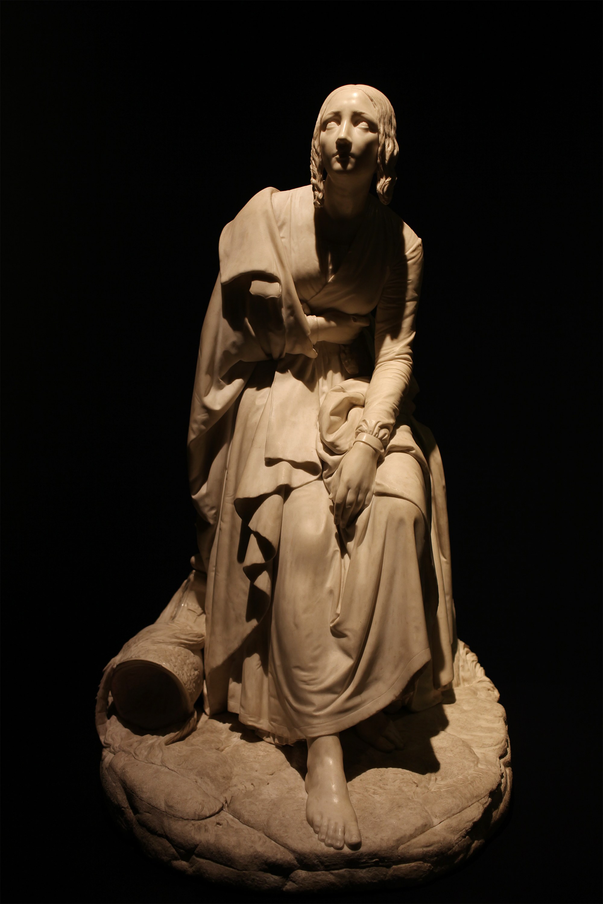 Giovanni Pandiani (1809-1879) La vedova del soldato (1851) di fronte. Collezione Litta